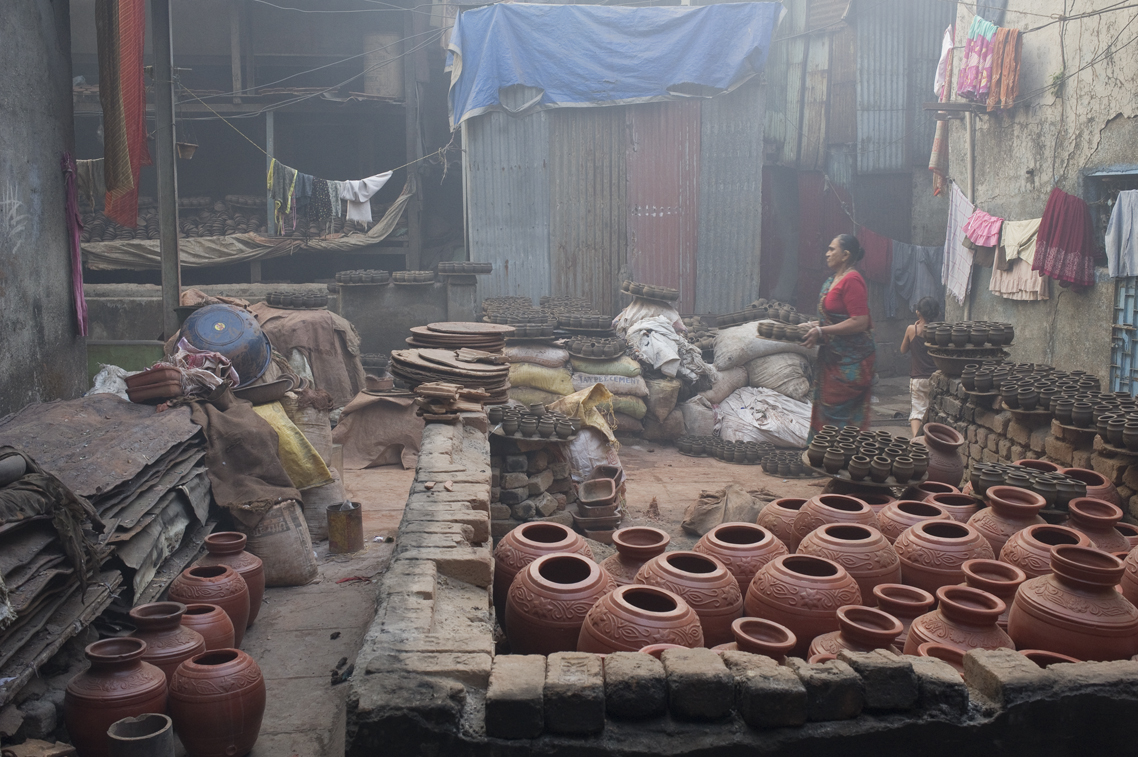 Das Slum Dharavi liegt sehr zentral in der Stadt Mumbai. Aus diesem Grund ist der Boden, auf dem die einfachen Behausungen stehen, extrem wertvoll. Pläne, diesen Stadtteil abzureißen und von Grund auf neu zu bauen, wurden verschoben. Nach anfänglicher Euphorie tauchten Fragen auf, was mit den Menschen und dem Gewerbe, die sich hier etabliert haben, passieren wird. Den Menschen mit Besitzanspruch wurden zwar Wohnungen in dem neuen Stadtteil versprochen, jedoch befürchten die Leute, dass dem Gewerbe nicht mehr wie gehabt nachgegangen werden kann. Man darf nicht vergessen, dass viele Leute mit ihrem Betrieb in Dharavi sehr reich geworden sind. Besitzansprüche sind also sehr wohl vorhanden. Zudem darf man nicht vergessen, dass hier für eine Stadt überlebenswichtige Arbeiten geleistet werden, wie zum Beispiel die Müllentsorgung. Die Stadt selber kümmert sich nicht um eine ausreichende Müllentsorgung und man ist sich nicht sicher, was passieren würde, wenn man dieses Gewerbe in Dharavi schließen würde.